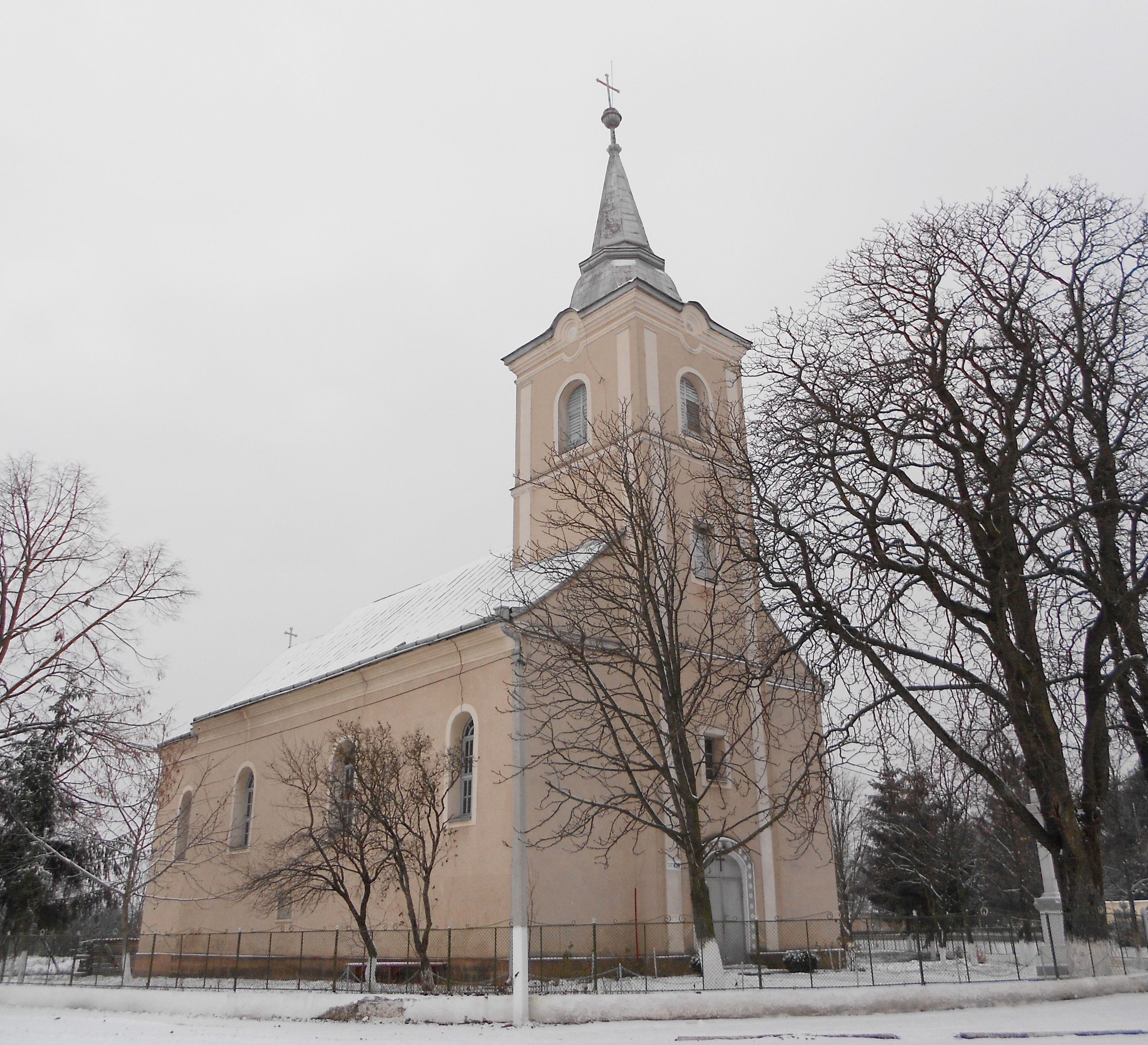 Католицька церква в с. Оросієво